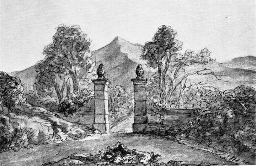 Gartentür auf der Höhe gegen Lichtenhein, die Gegend und der Hausberg bei Sonnenuntergang. Bleistift, Feder mit Tinte, Sepialavierung. Blatt 4 der 22 Blätter. 211x345mm, graues Papier. NFG/GNM Corp.IVa,280 (Original description: Blick auf den Jenzig Feder- und Tuschezeichnung von Goethe 1810. Aus der zu 185 genannten Mappe)